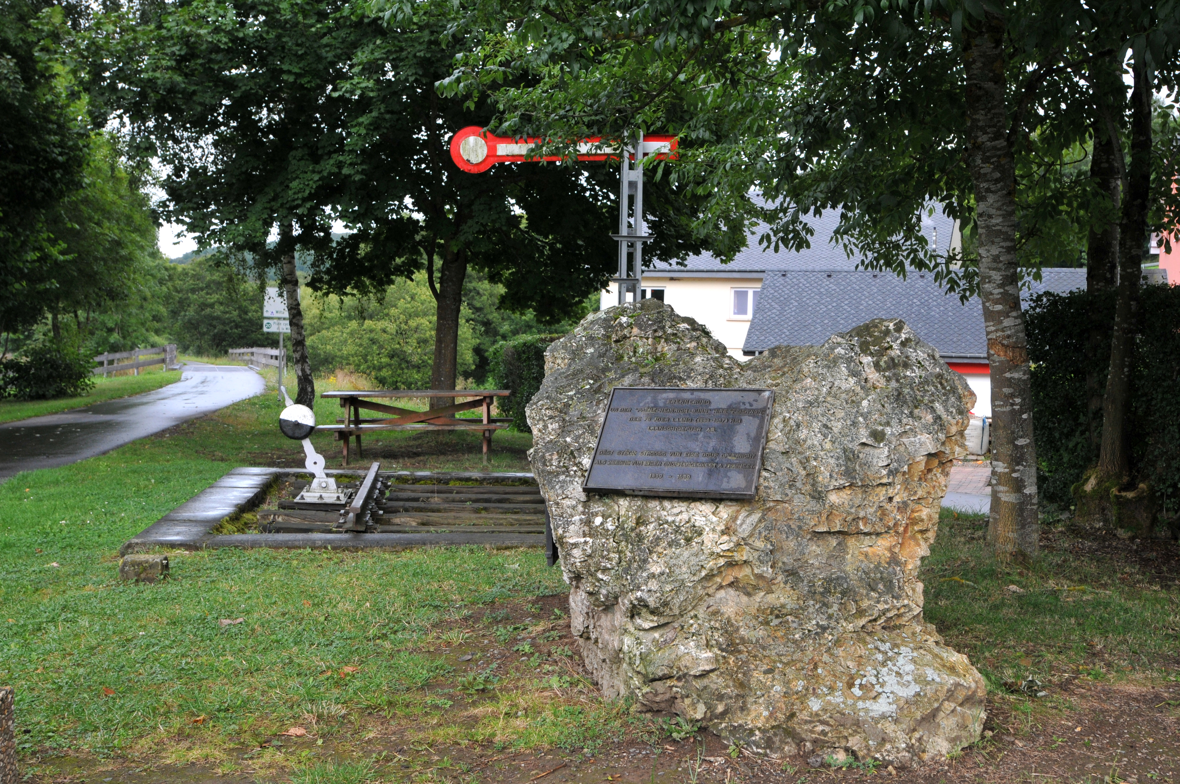 Erënnerung un déi fréier Prënz Heinrich Bunn" zu Wanseler, elo en Deel vun der Vëlospist Piste cyclable de la Wiltz.